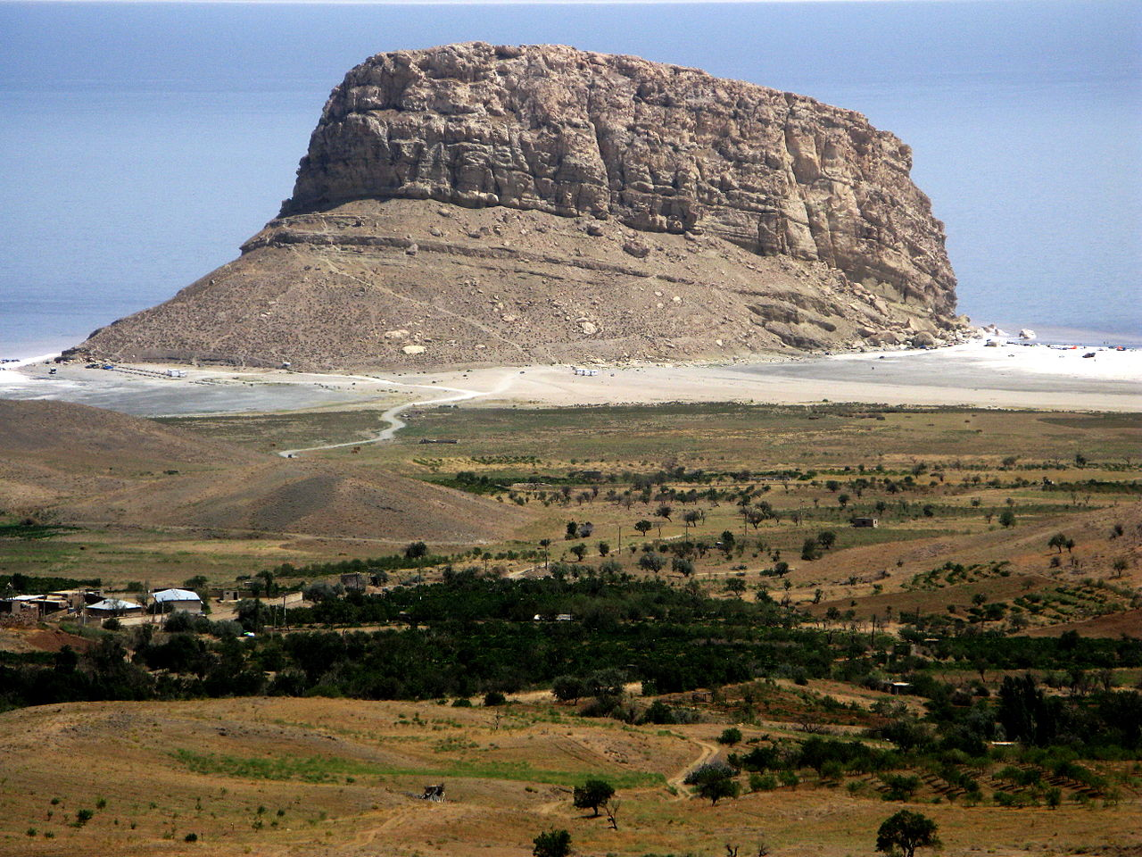 Kazim Dashi